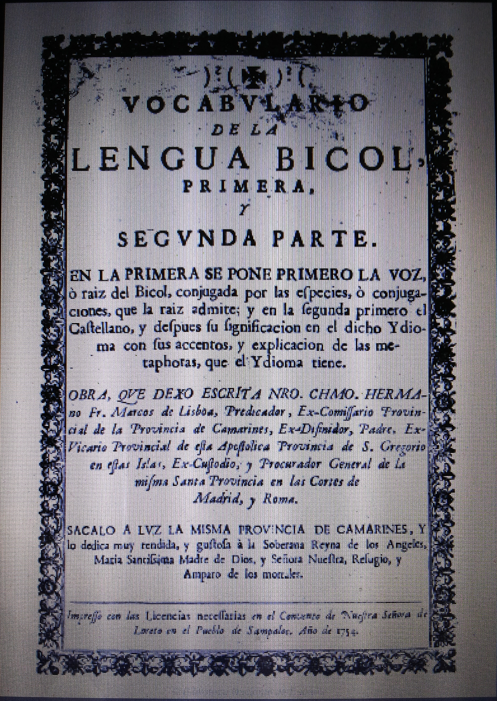 Bikol Central: Vocabulario de la lengua bicol 1754